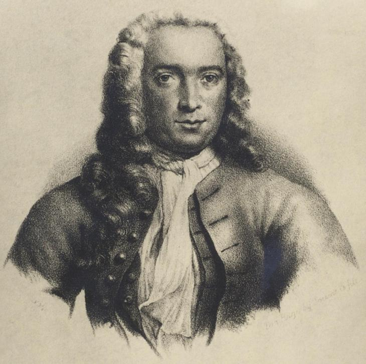 Nicolaas Laurens Burman (1733-1793)